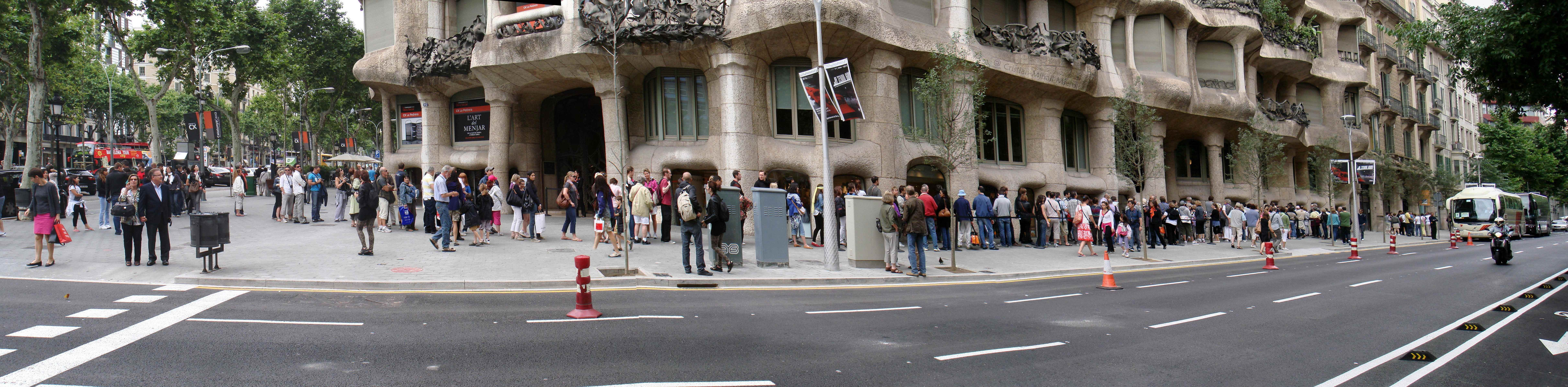 Coada la bilete pentru Casa Milà din Barcelona, una dintre realizările arhitectului Antoni Gaudí.